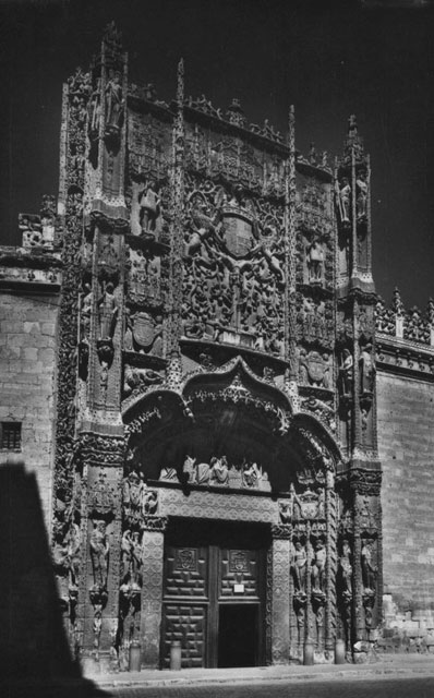 Museo Nacional de Escultura - Valladolid - Postal Madrid. Foto Alfonso - Nº 22. Valladolid. Fachada de San Gregorio. Museo Nacional de Escultura. Texto manuscrito. - Tarjeta postal. Papel 90 x 140 mm B/N